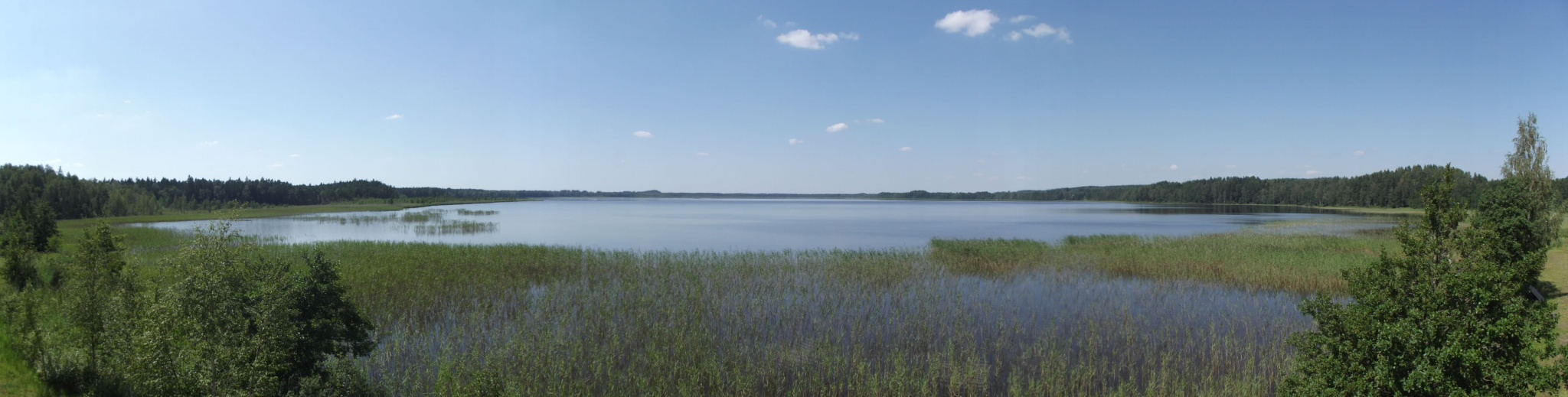 Zebrus ezers